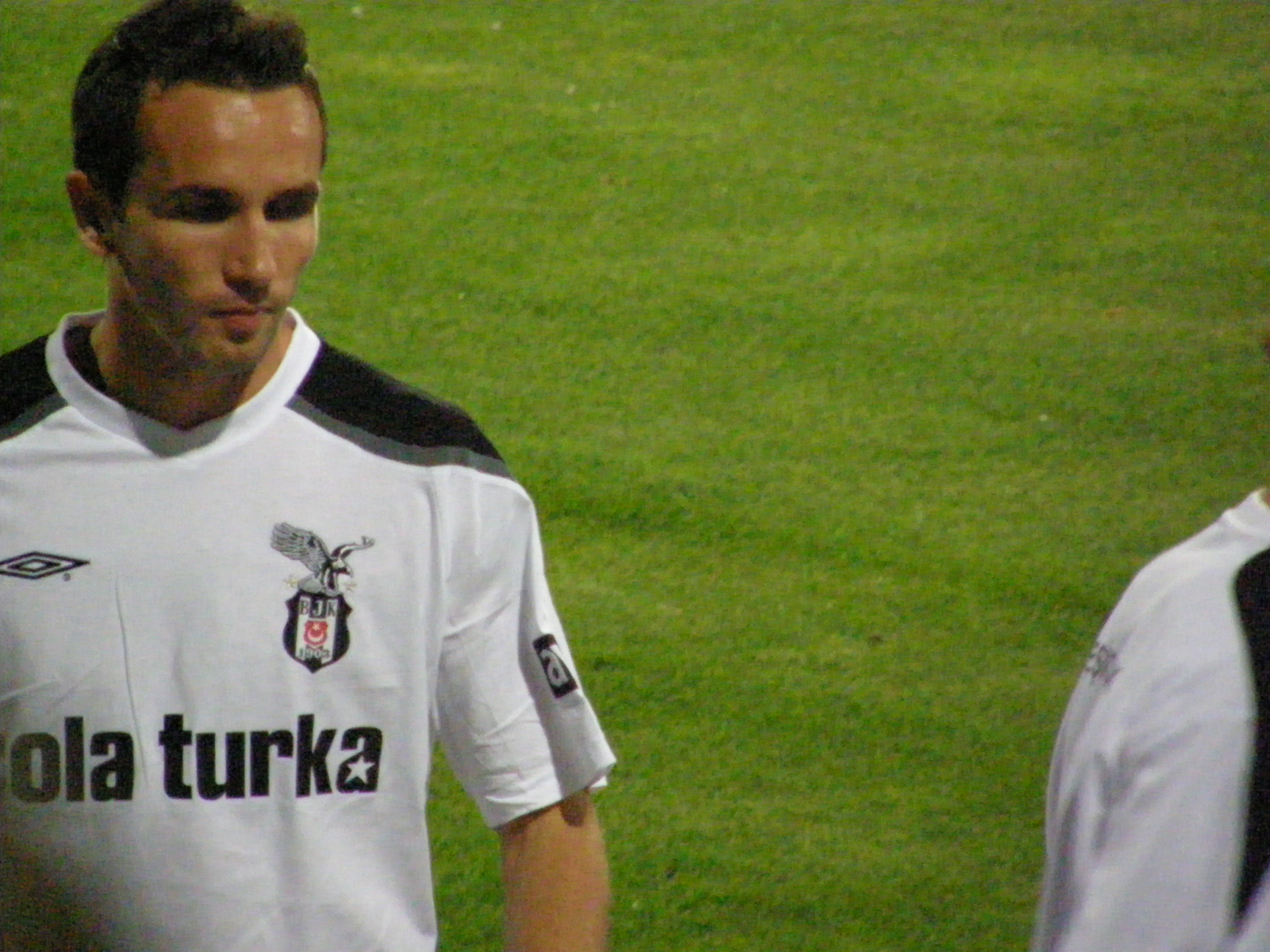 2008-2009 Beşiktaş Hacettepespor maçında tarafımdan çekilmiştir.